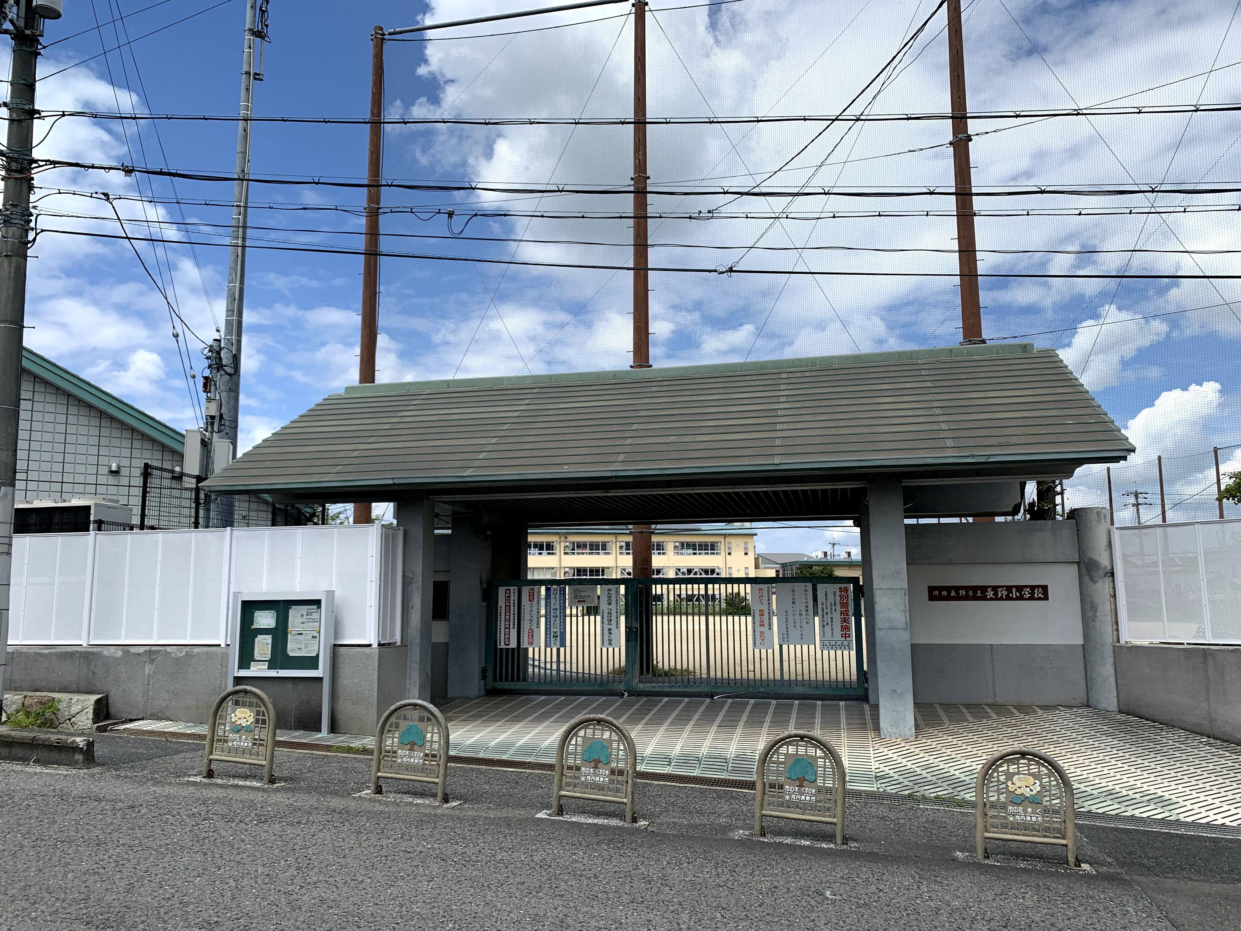 河内長野市立長野小学校（正門前）